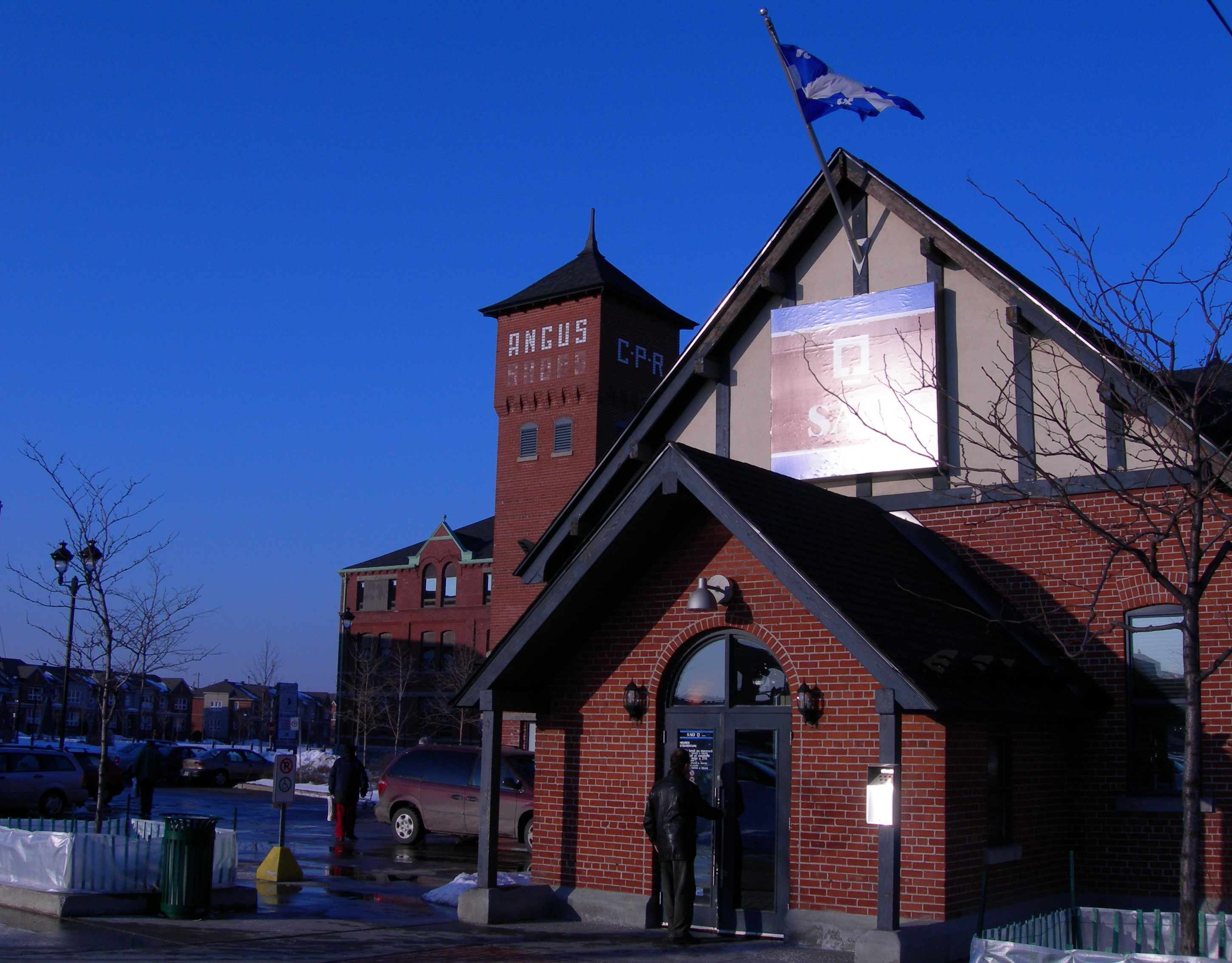 Shops Angus, Montréal / Montreal, SAQ